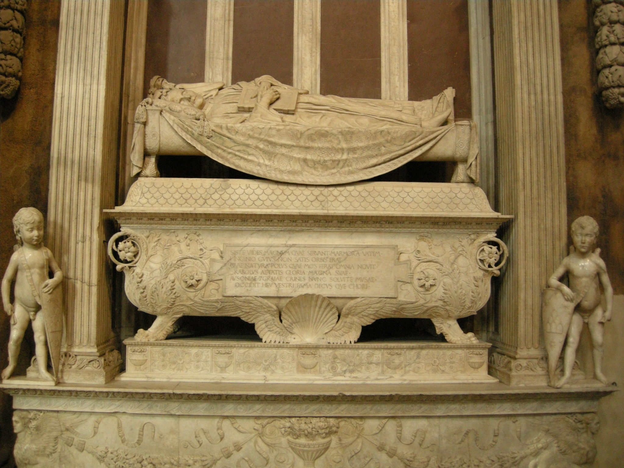 Santa croce, navata, tomba di carlo marsuppini